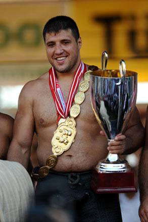 Kırkpınar Yağlı Güreşleri 2008 yılı kürsü görüntüsü